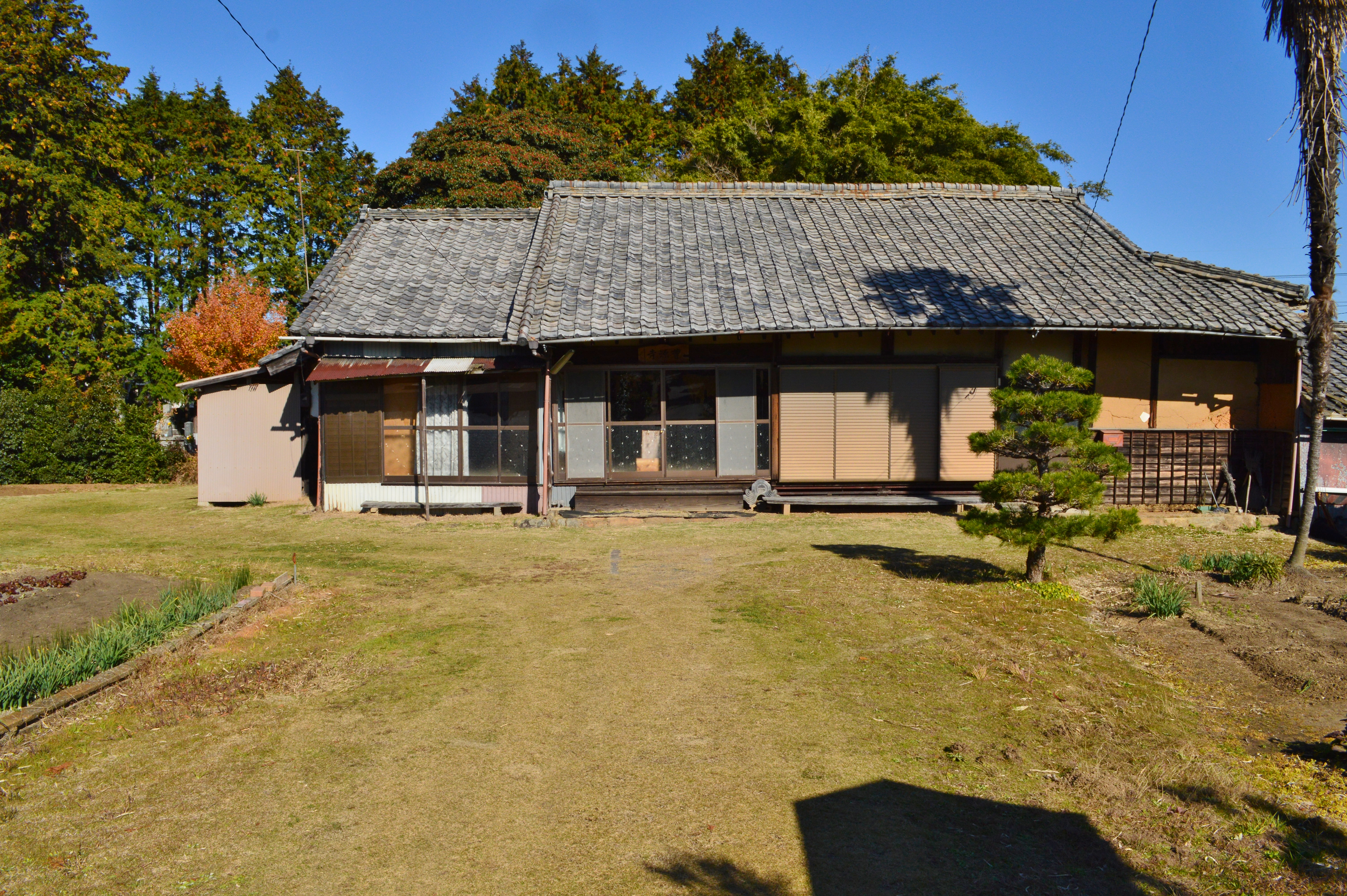 曹源寺本堂 (三河国府跡（白鳥遺跡）)